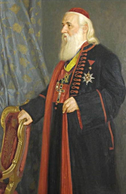 Mitropolitul Ioan Meţianu (n. 9 mai 1828, Zărnești, județul Brașov - d. 3 februarie 1916, Sibiu, județul Sibiu).